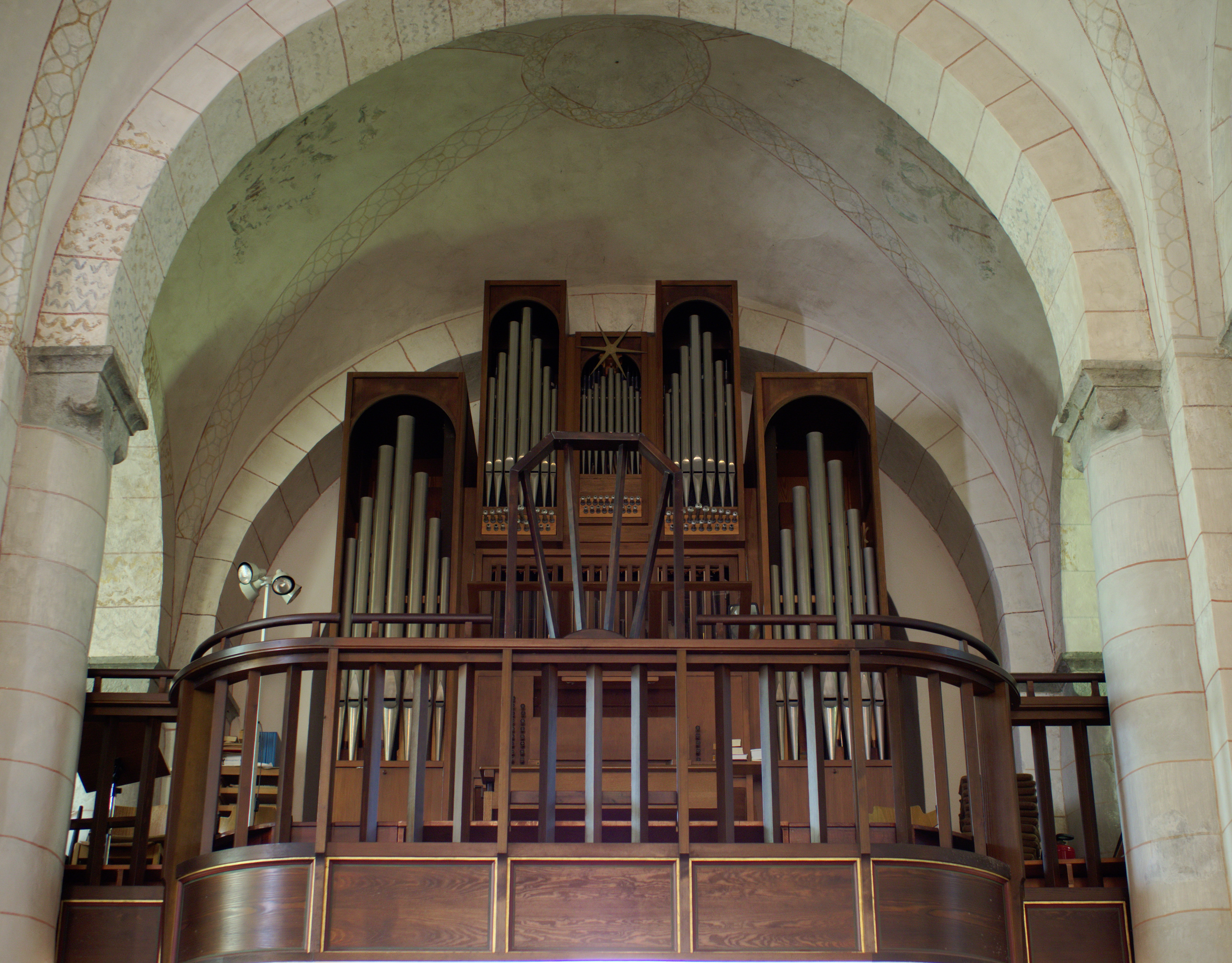 Die Orgel (erbaut 1977 von der Firma Emil Hammer) auf der Empore in der Christuskirche, Kirchplatz 9, Plettenberg.